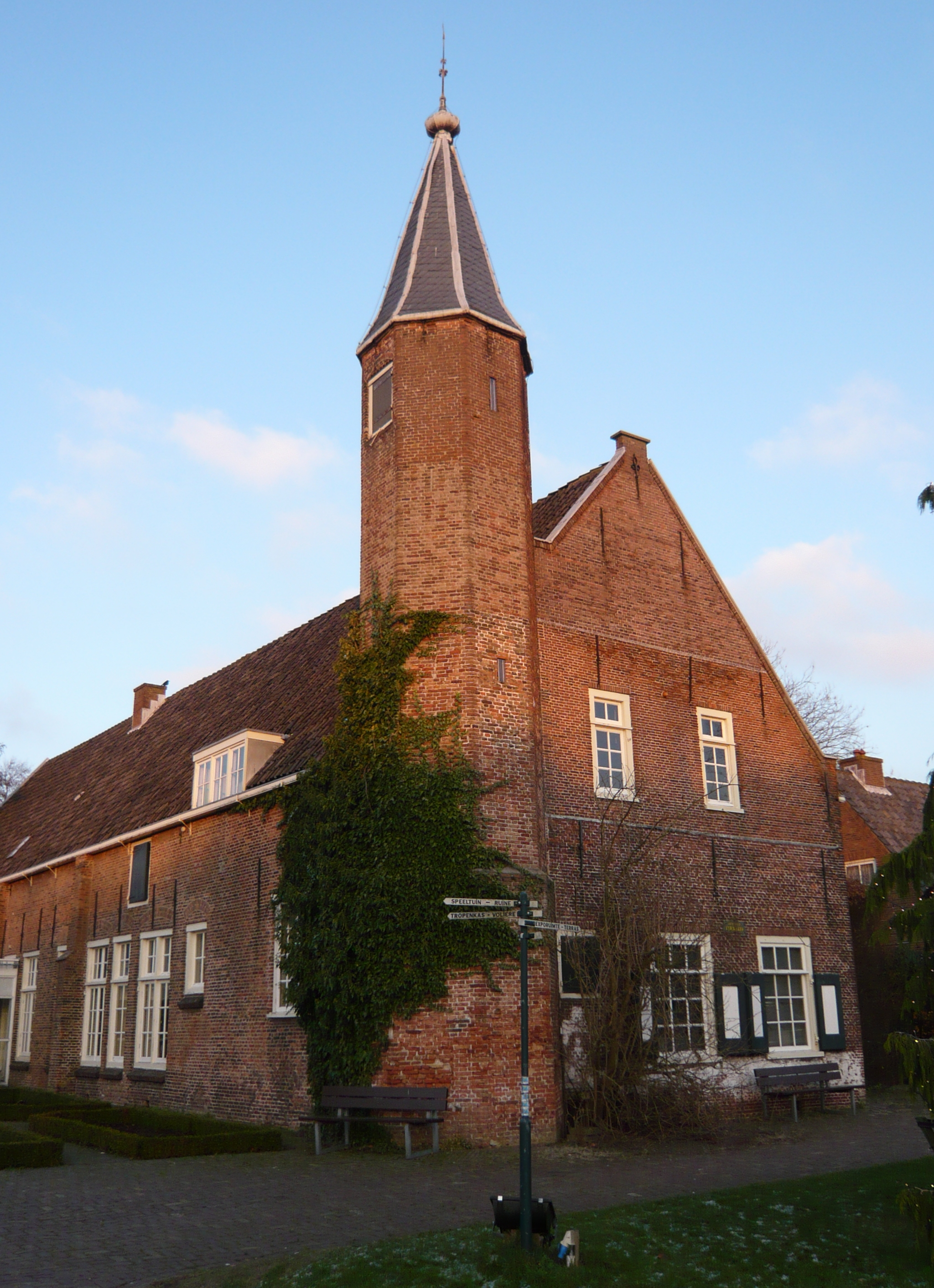 Kaatsbaan, restant voorburcht Huis ter Kleef, Haarlem